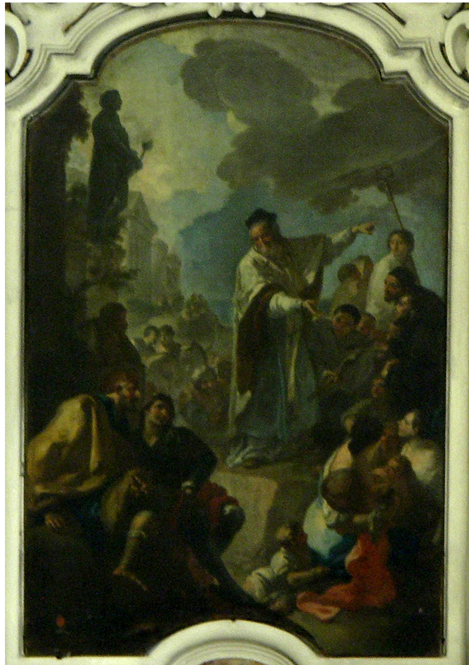 Cattedrale di Brindisi, Altare di San Leucio, Dipinto di Oronzo Tiso